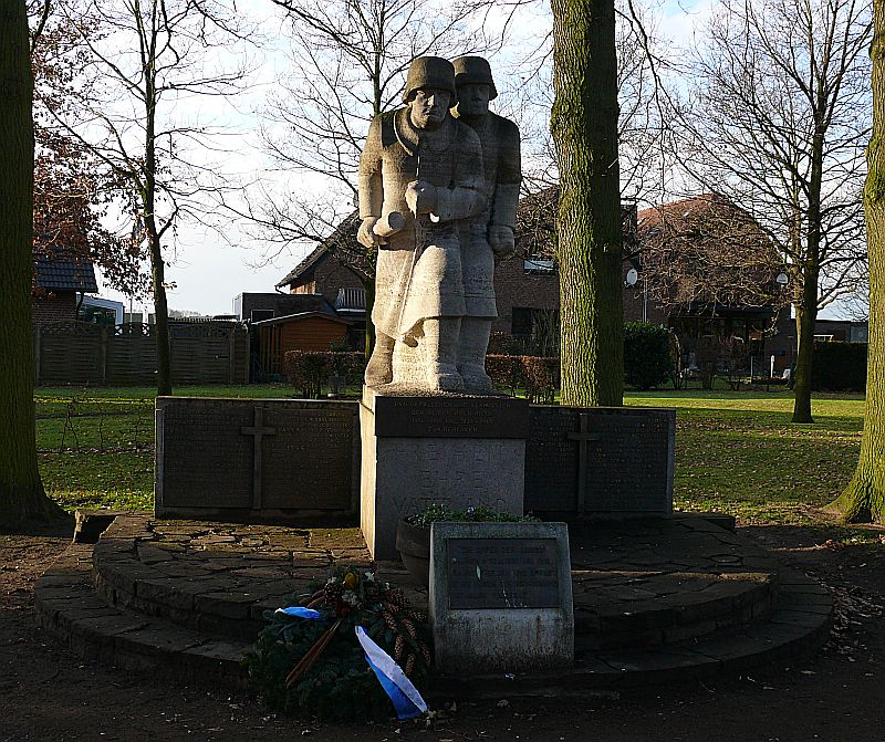 Haltern Lippramsdorf Ehrenmal, eigenes Foto